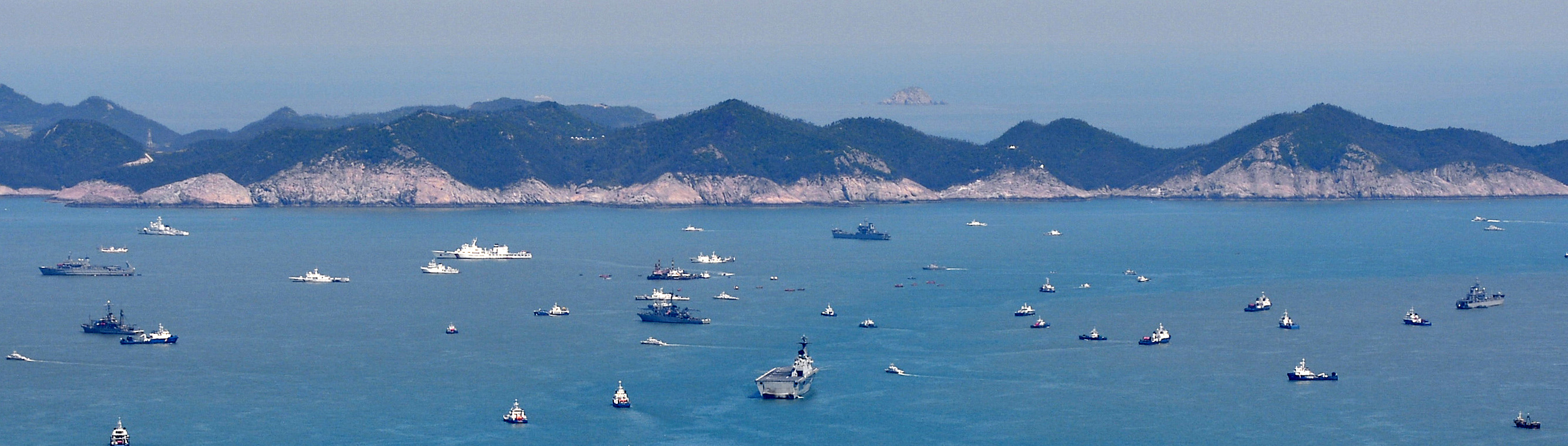 세월호 침몰 해역에 1만 4000톤급 대형수송함 독도함을 비롯한 해군 함정과 해양경찰 경비정, 어선듥이 촘촘한 그물마을 형성한 가운데 탐색·구조작전을 벌이고 있다.